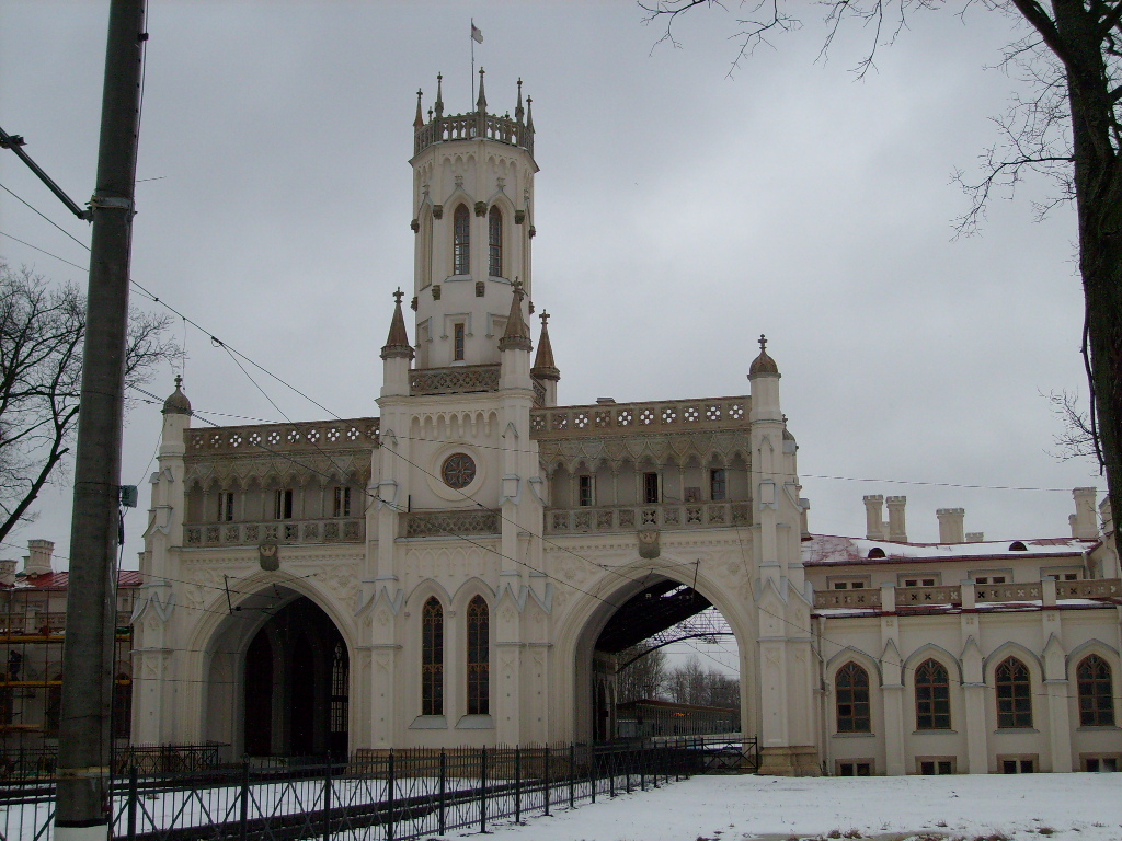 Вокзал станции Новый Петегоф